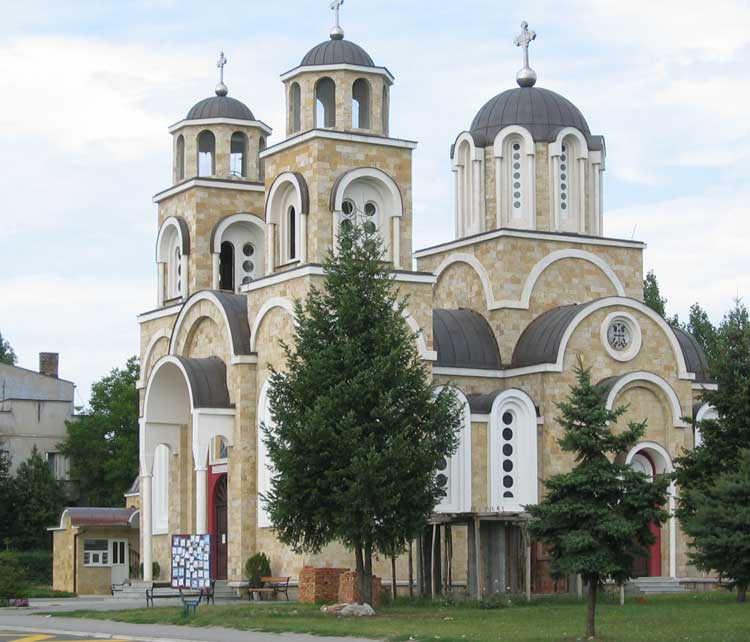 Црква Свете Петке, Смедеревска Паланка